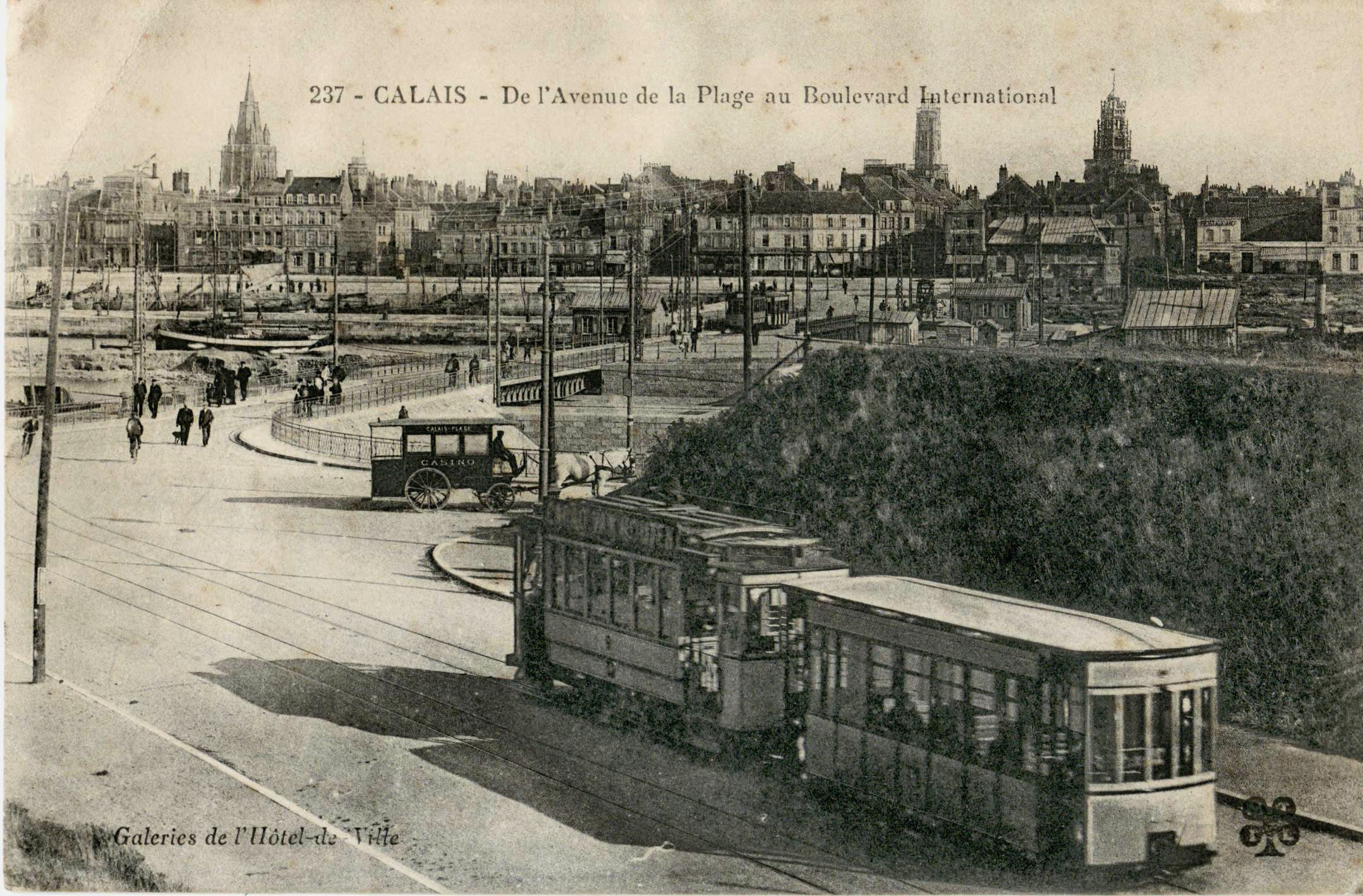 Carte postale ancienne éditée par MTIL 237 pour les Galeries de l'Hôtel de Ville, n°237 :CALAIS - De l'avenue de la Plage au Boulevard International